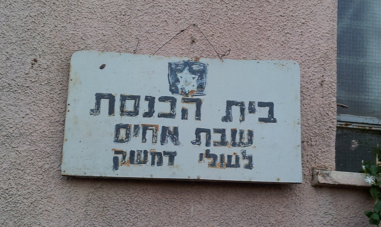 בית הכנסת "שבת אחים" ברחוב יסוד המעלה בתל אביב: שלט. צולם ב-11 ביוני 2012